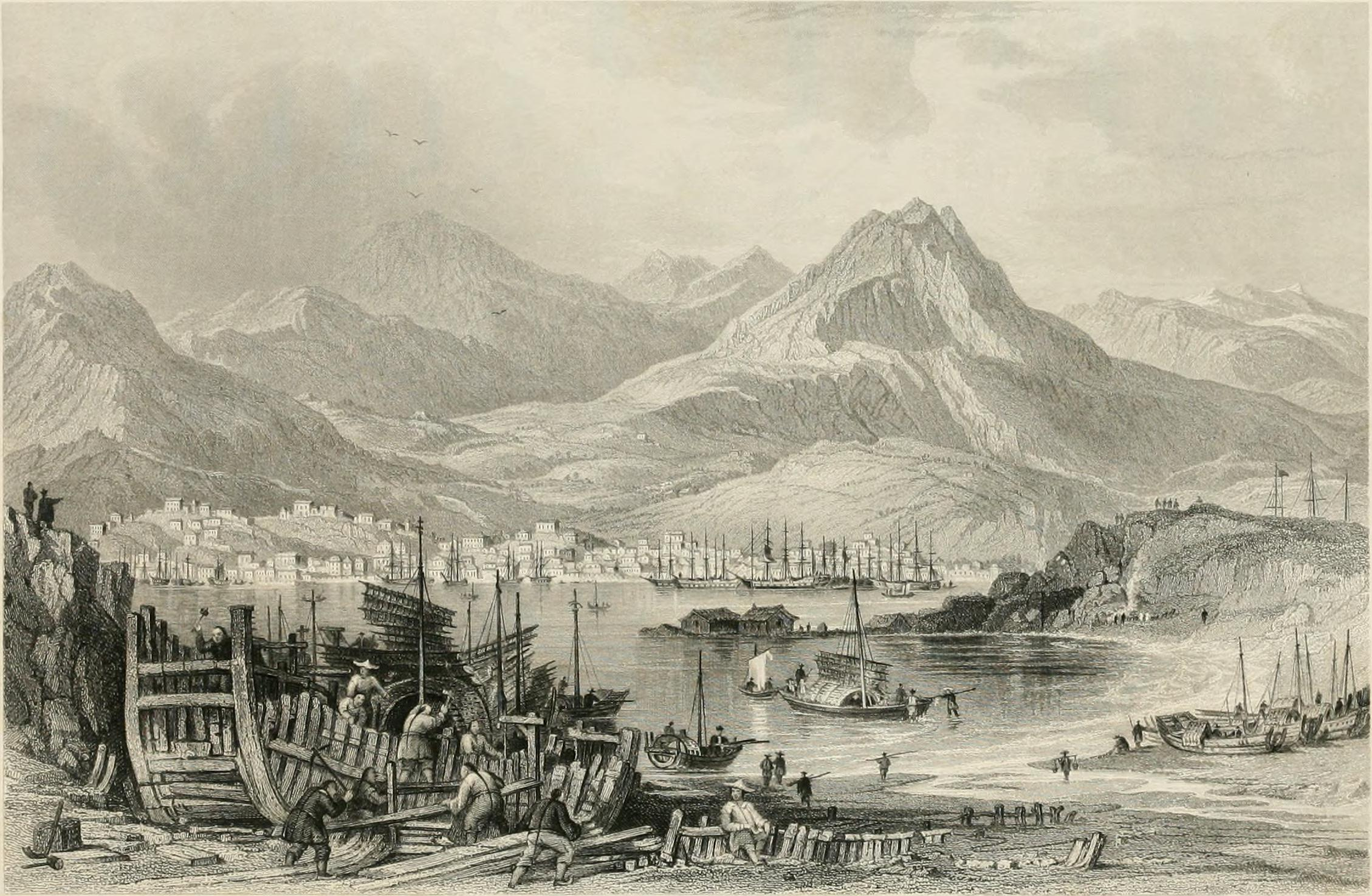 Hong Kong from Kowloon.